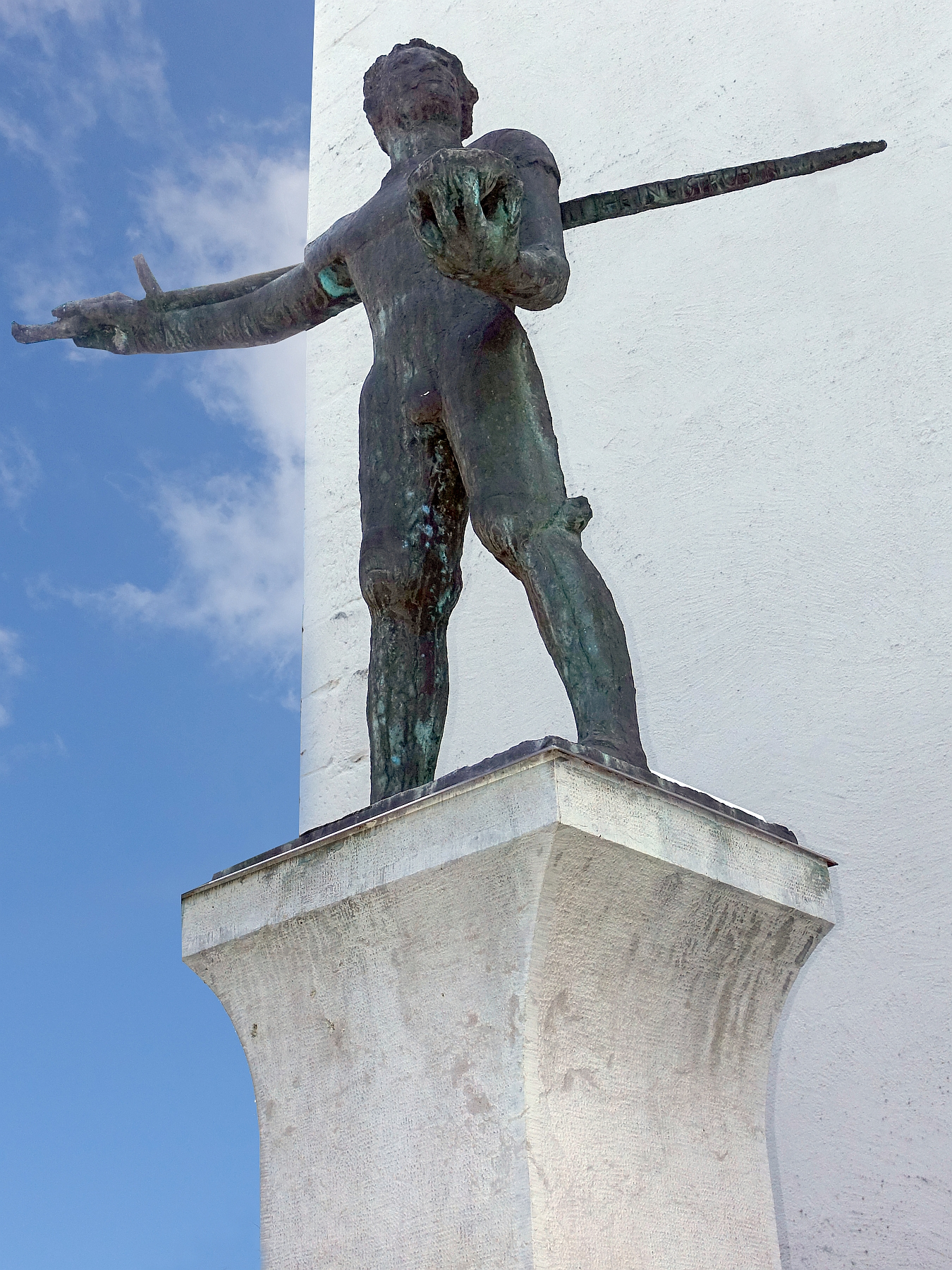 Heinrich Strübin (1450–1517) Skulptur-Brunnen vor dem Museum Basel-Land in Liestal, Schweiz. Wirt zur Sonne in Liestal. 1480 Mitglied des Rats und 1496-1517 Schultheiss von Liestal. In den Burgunderkriegen erbeutete Strübin als Feldzeugmeister 1477 bei Nancy eine Schale. Auf der Schwertklinge ist «Heinrich Strübin» eingraviert. In der Westseite des Brunnens ist die Inschrift «Nancy 1477», weil Heini Strübin von Liestal an der Schlacht von Nancy teilnahm und die bekannte Burgunderschale erbeutete. Die Brunnenfigur hält in den Händen ein Langschwert und die genannte Schale. Brunnen und Figur erinnern somit an zwei wichtige Ereignisse der Stadt Liestal im Mittelalter und in der Neuzeit.